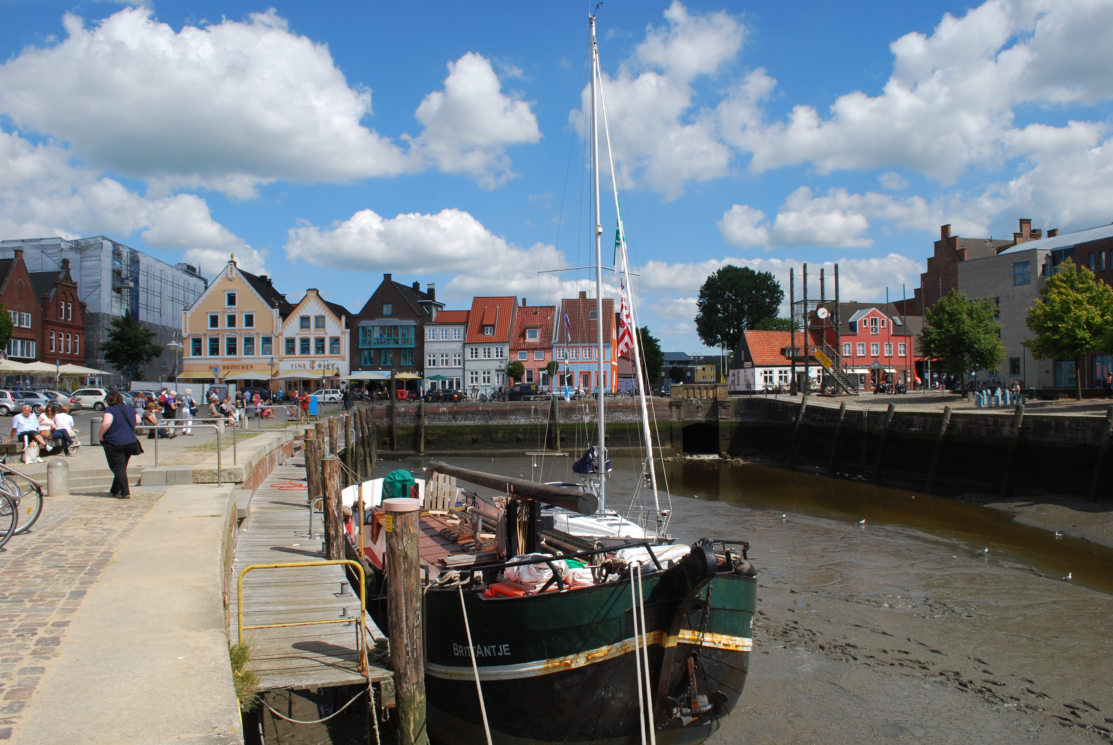 Husum - Germany